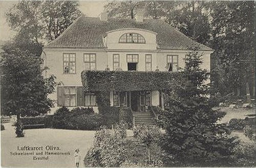 Luftkurort Oliva Schweizerei und Hammerwerk Ernsttal.